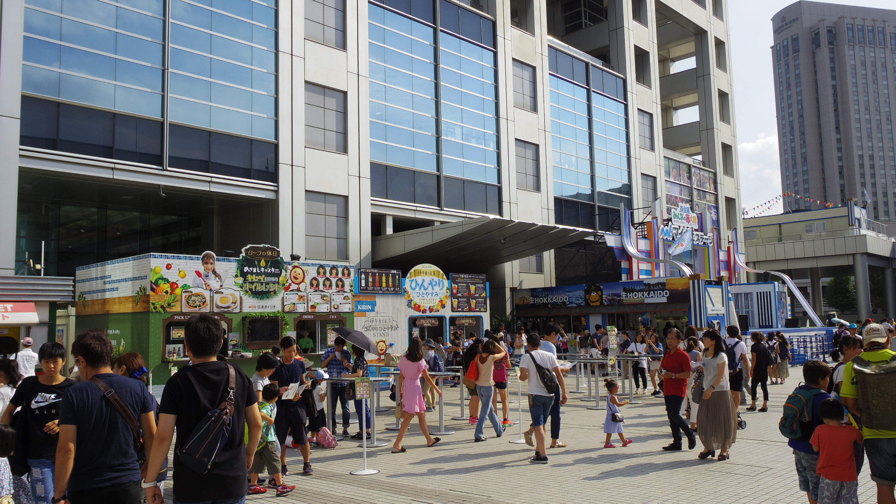 フジテレビの夏イベント「お台場みんなの夢大陸2017」より。2017年8月27日、フジテレビ本社屋1階広場にて撮影。